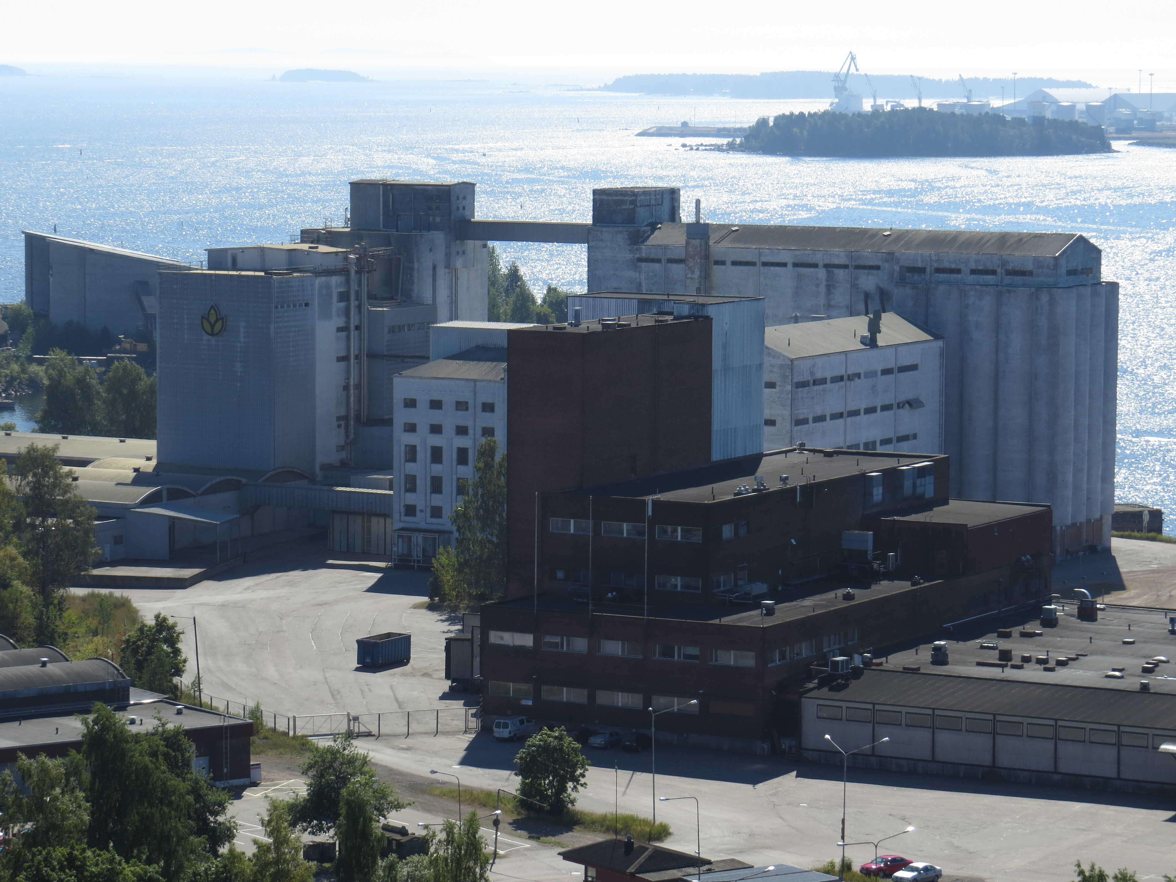 Vaasan-konsernin Kotkan tehdas Kotkansaarella.